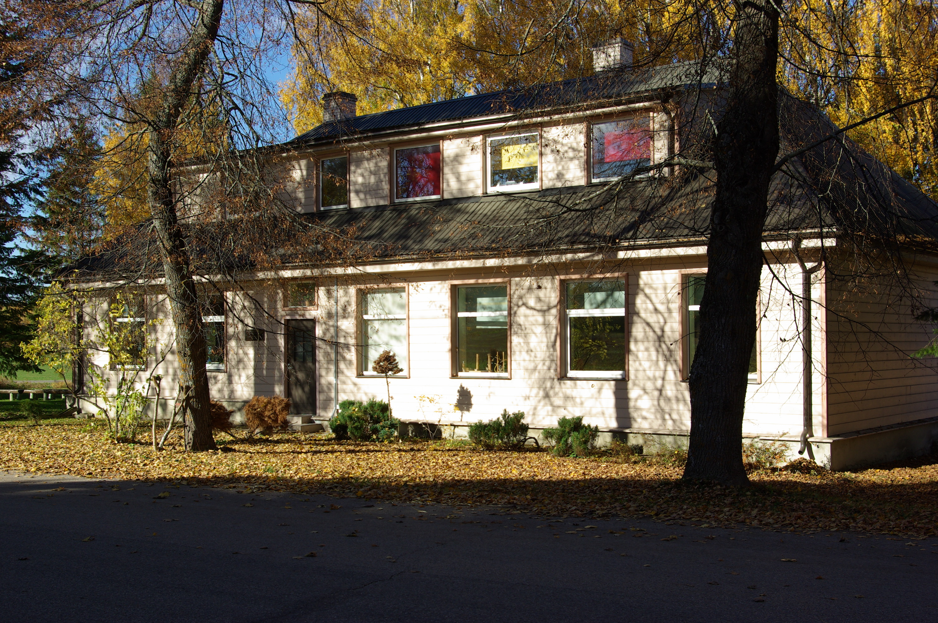 Meremäe noortekeskus